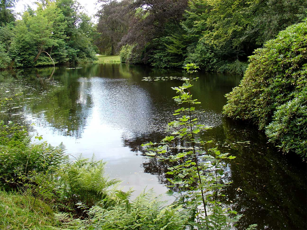 Landgoed de Braak (Eelde/Paterswolde) ontworpen door Lucas Pieters Roodbaard